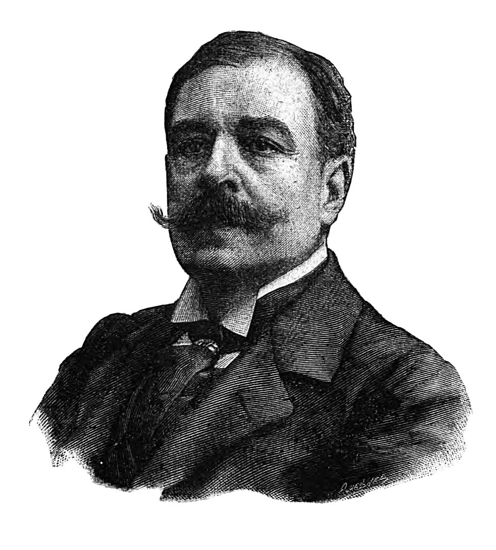 Octave_Mirbeau